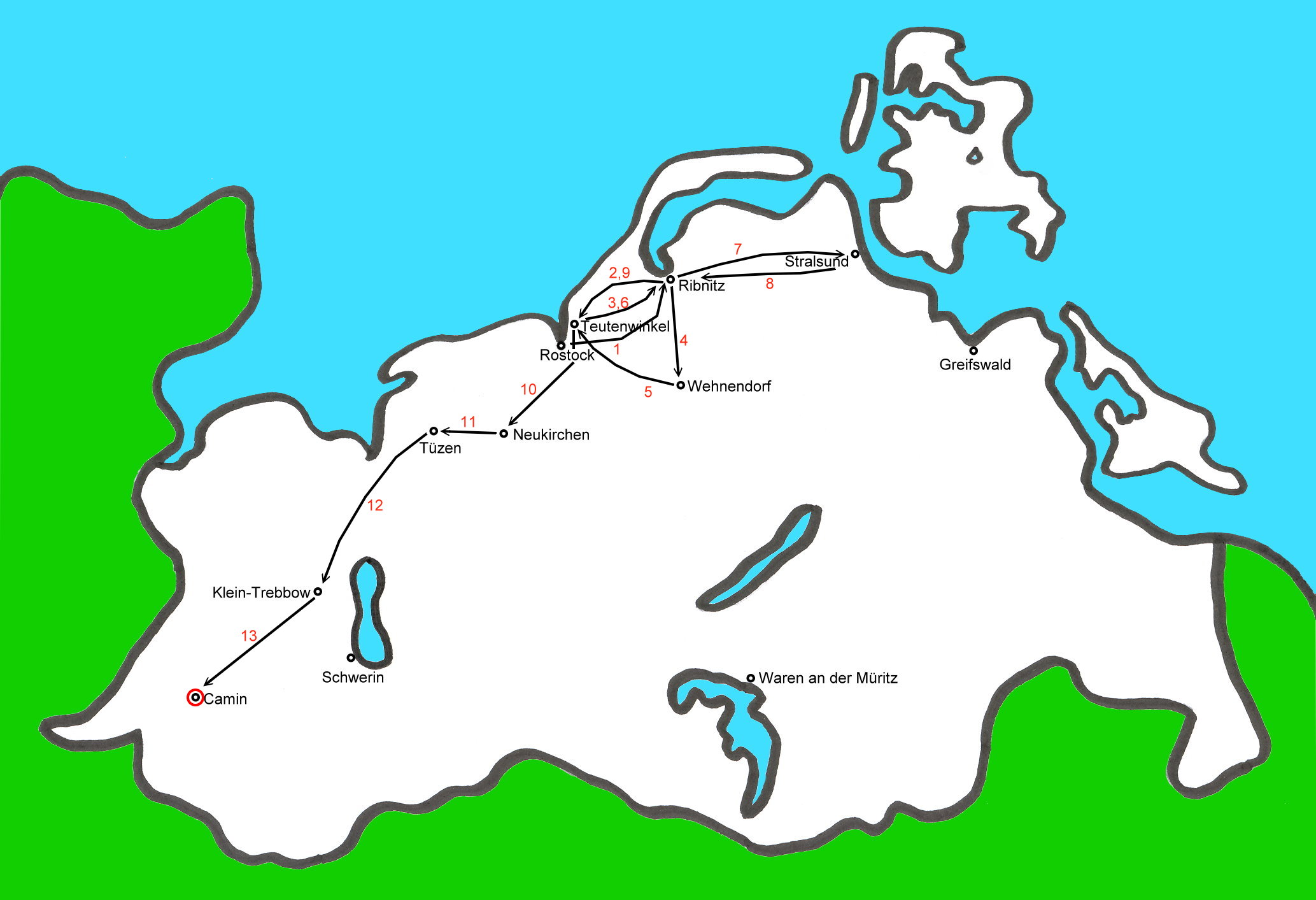 Stationen der Flucht von Wilhelm Ulenoge in Mecklenburg (November/Dezember 1569)